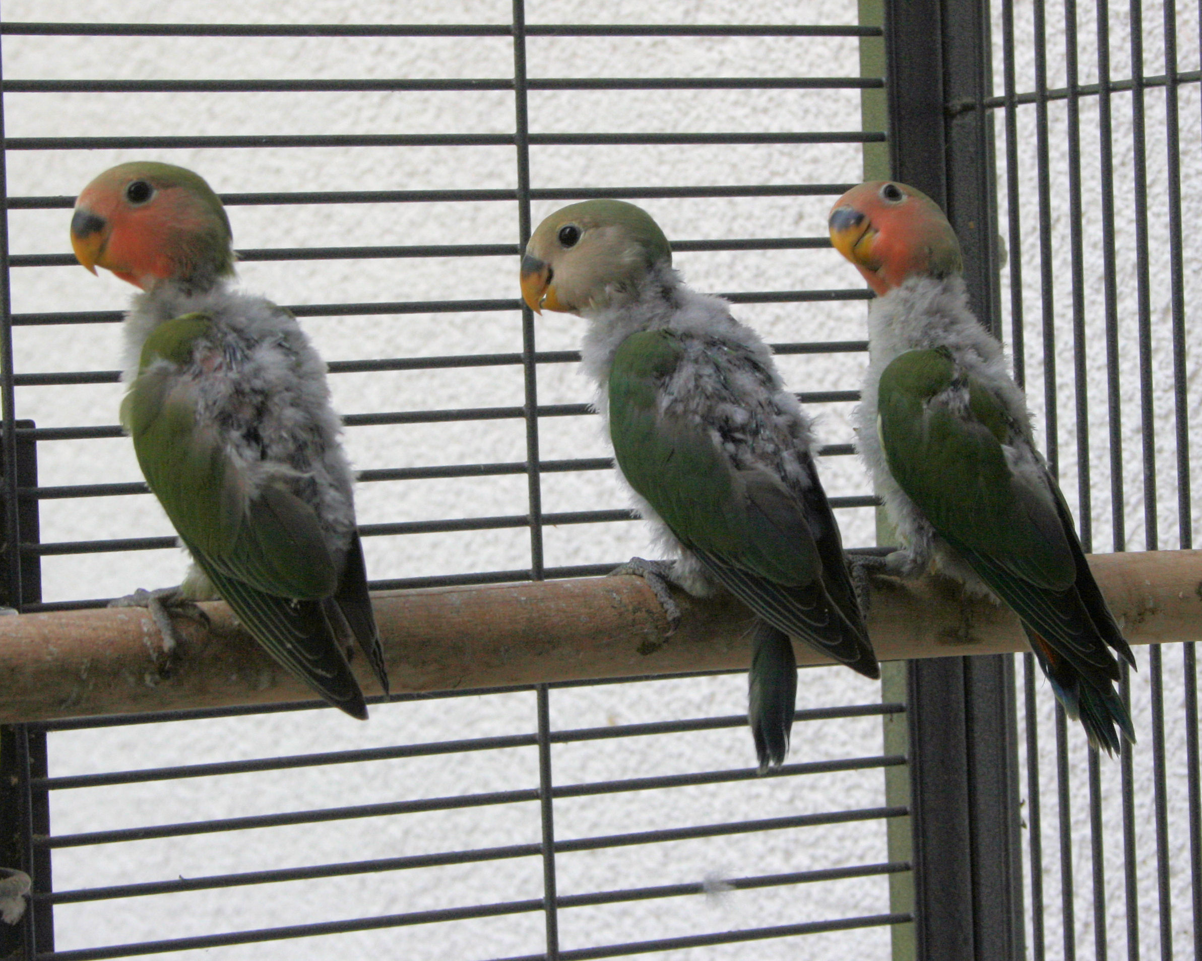 Agapornis roseicollis